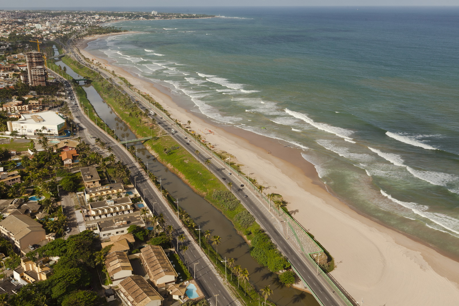 Rio Jaguaribe, em Salvador.